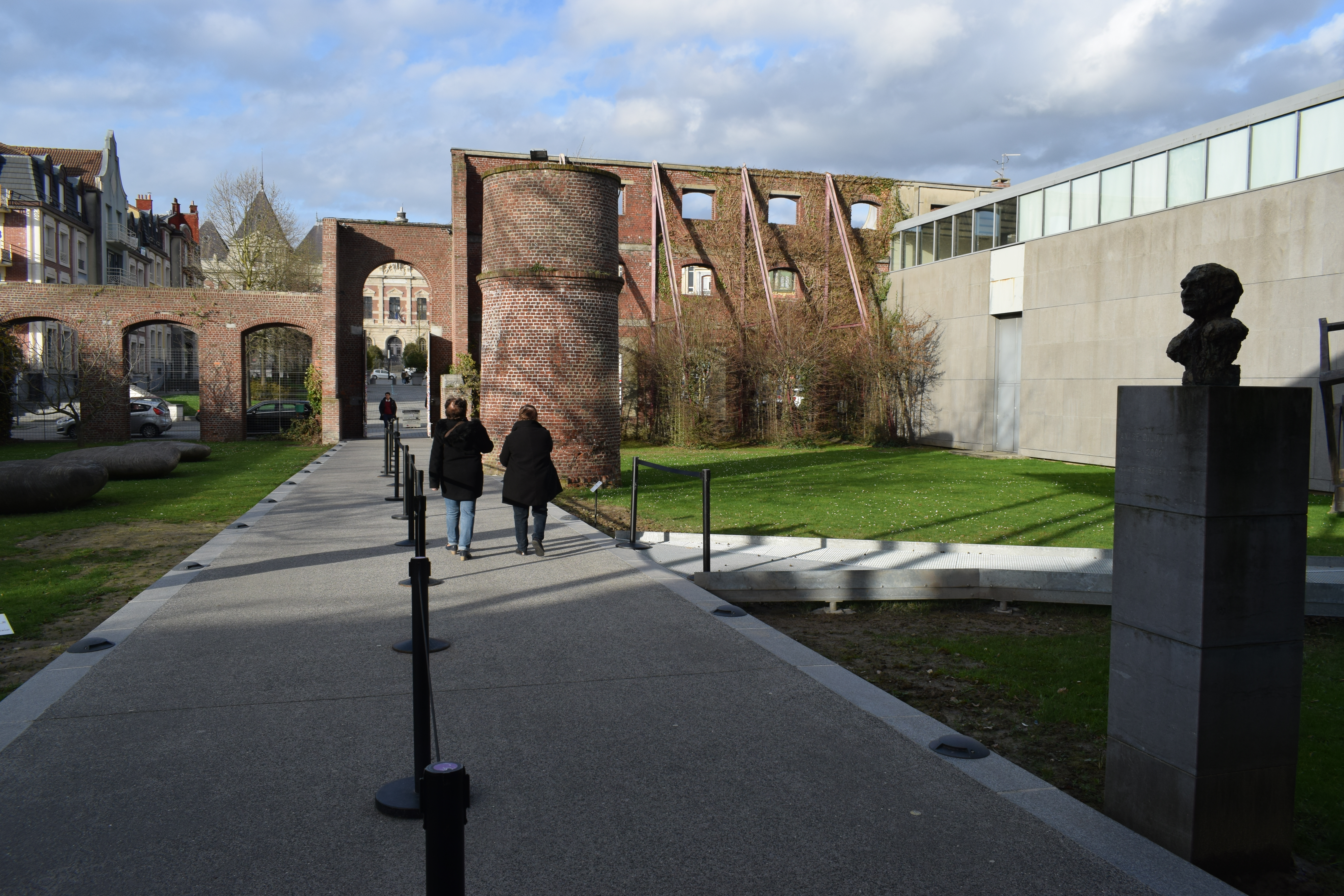 Vue de "La Piscine", Musée d'Art et d'Industrie de Roubaix.